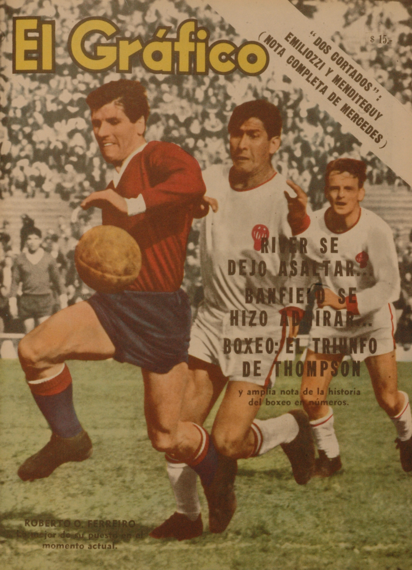 El Grafico del 02 de Octubre de 1963. Edicion 2295